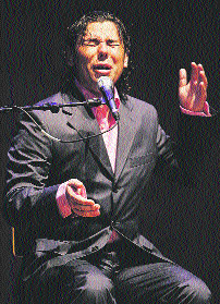 Miguel Poveda en escena